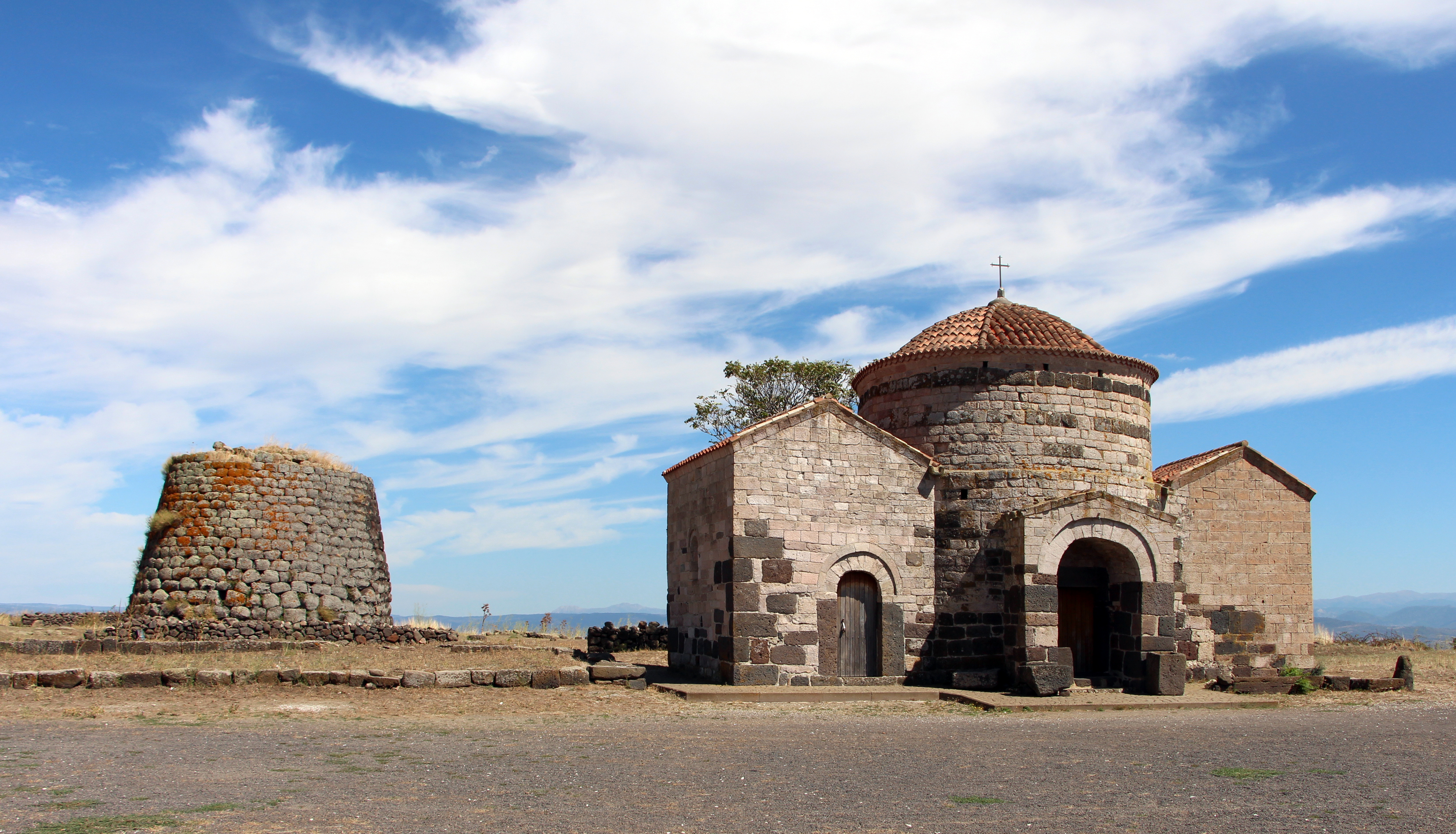 Església Sta Sabina i nurag (Macomer, Sardenya)